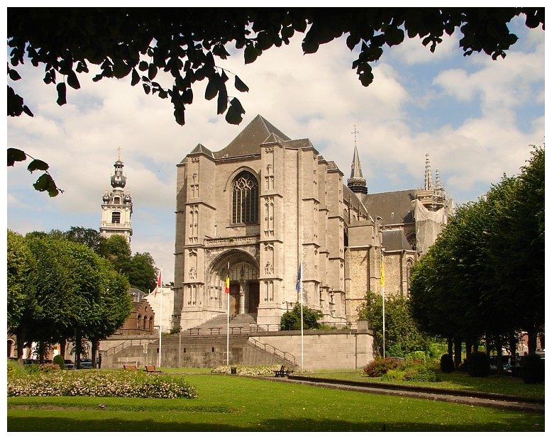 Collegiale kerk Sainte-Waudru, Bergen